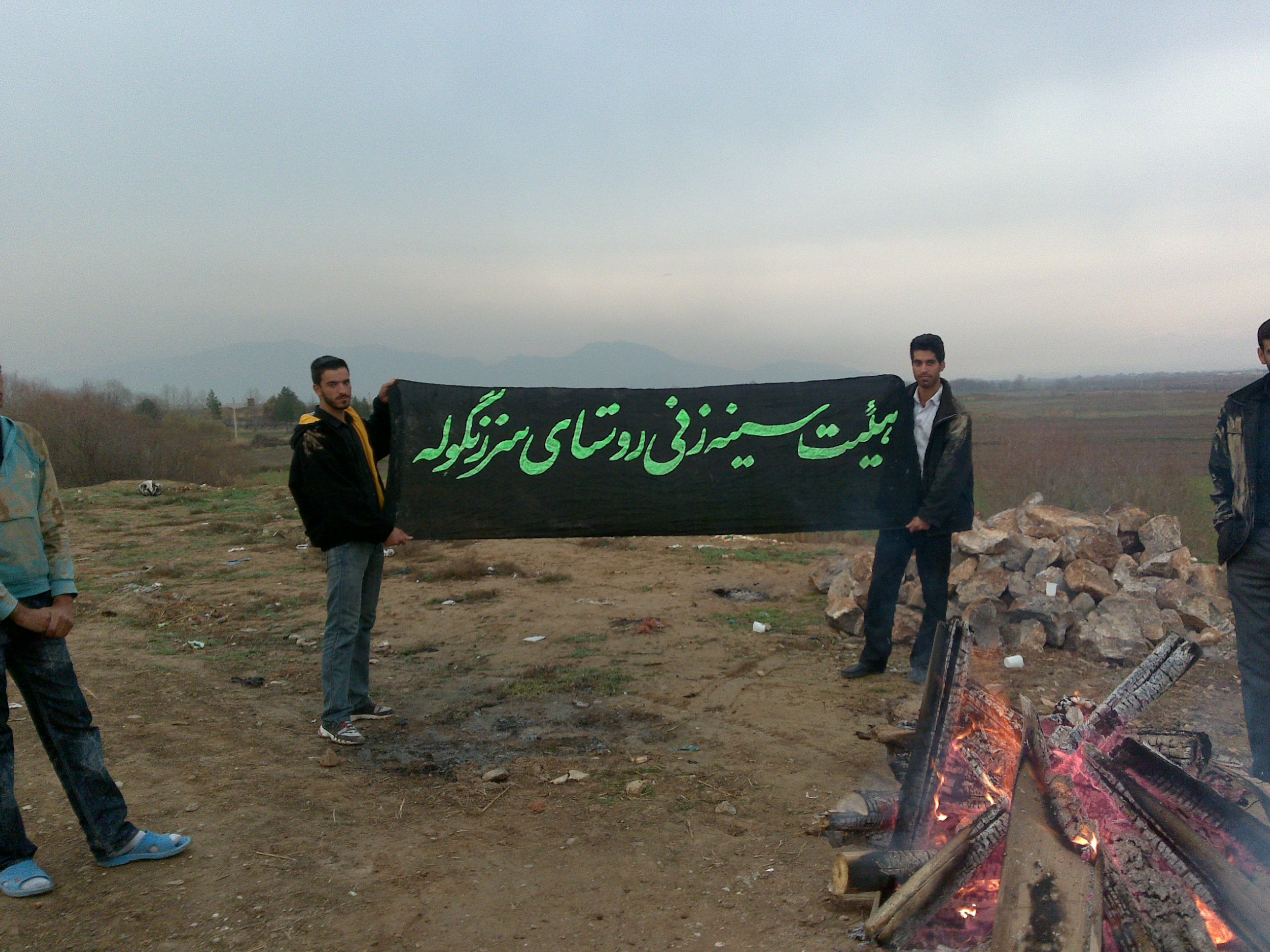 هیئت عزاداری روستای سرزنگوله